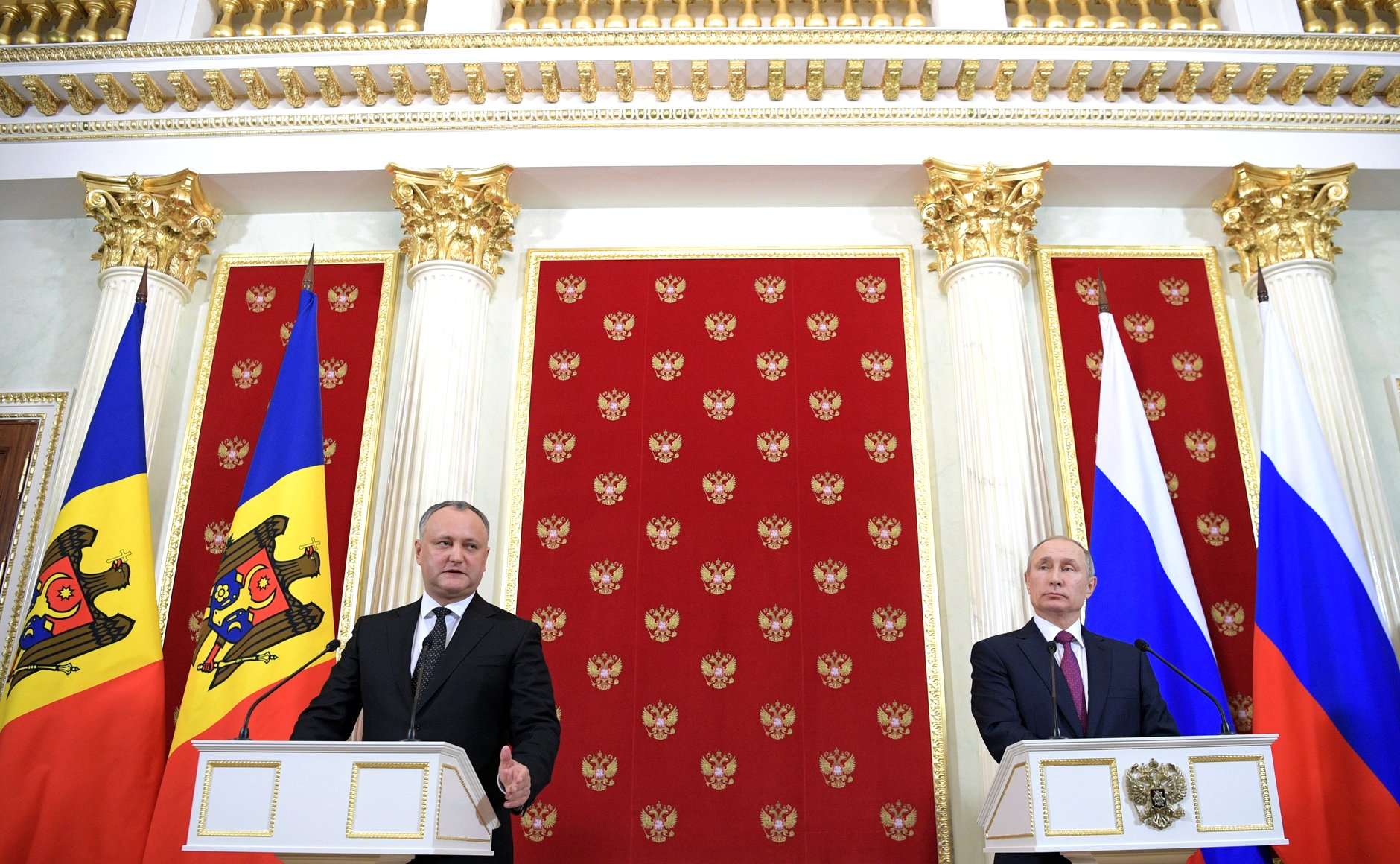 Совместная пресс-конференция Президента России Владимира Путина и Президента Молдовы Игоря Додона